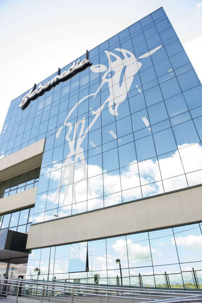 Fachada del edificio principal de Globomedia en Madrid.